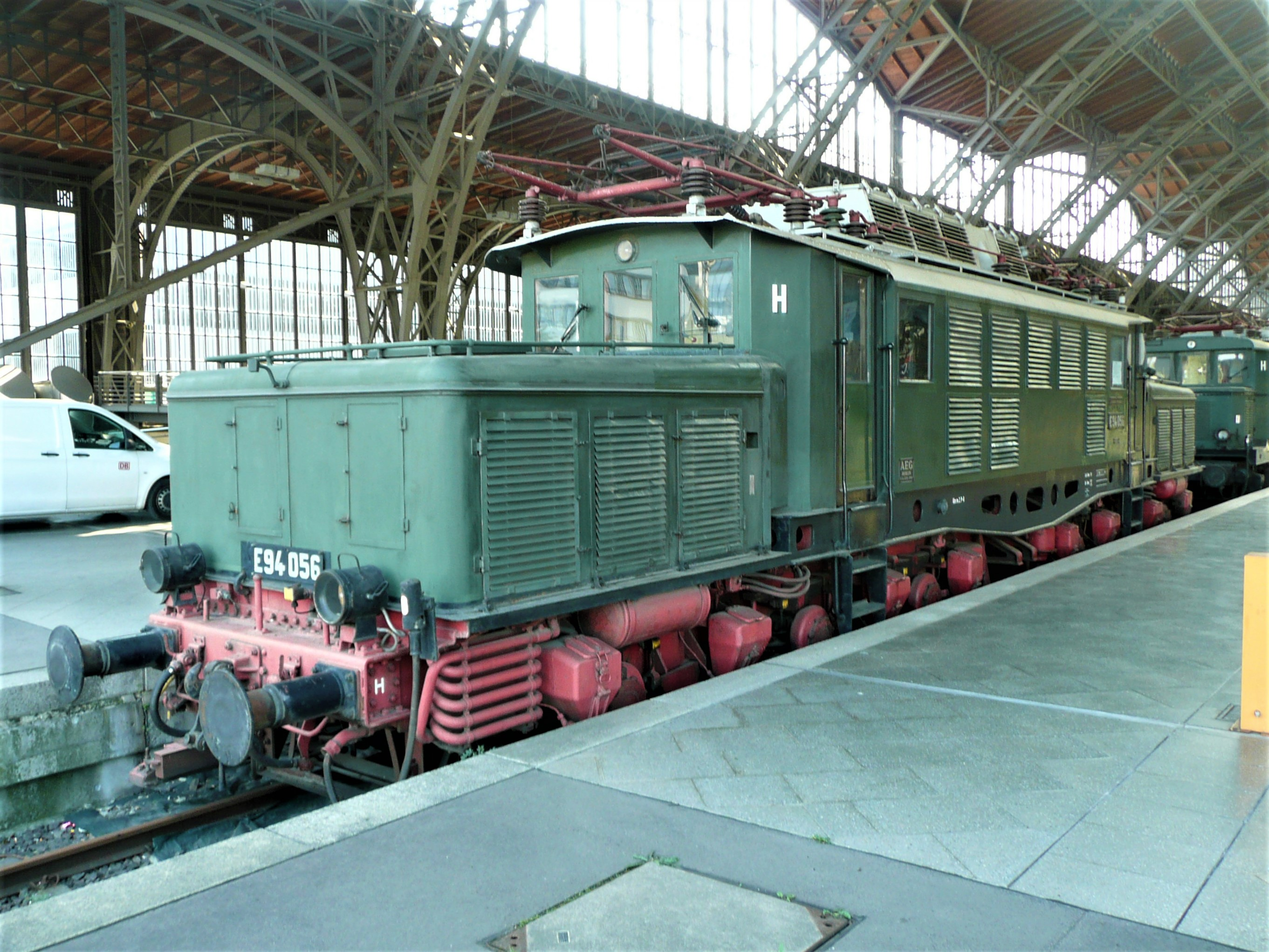 E94 056 im Bahnhof Leipzig Hbf